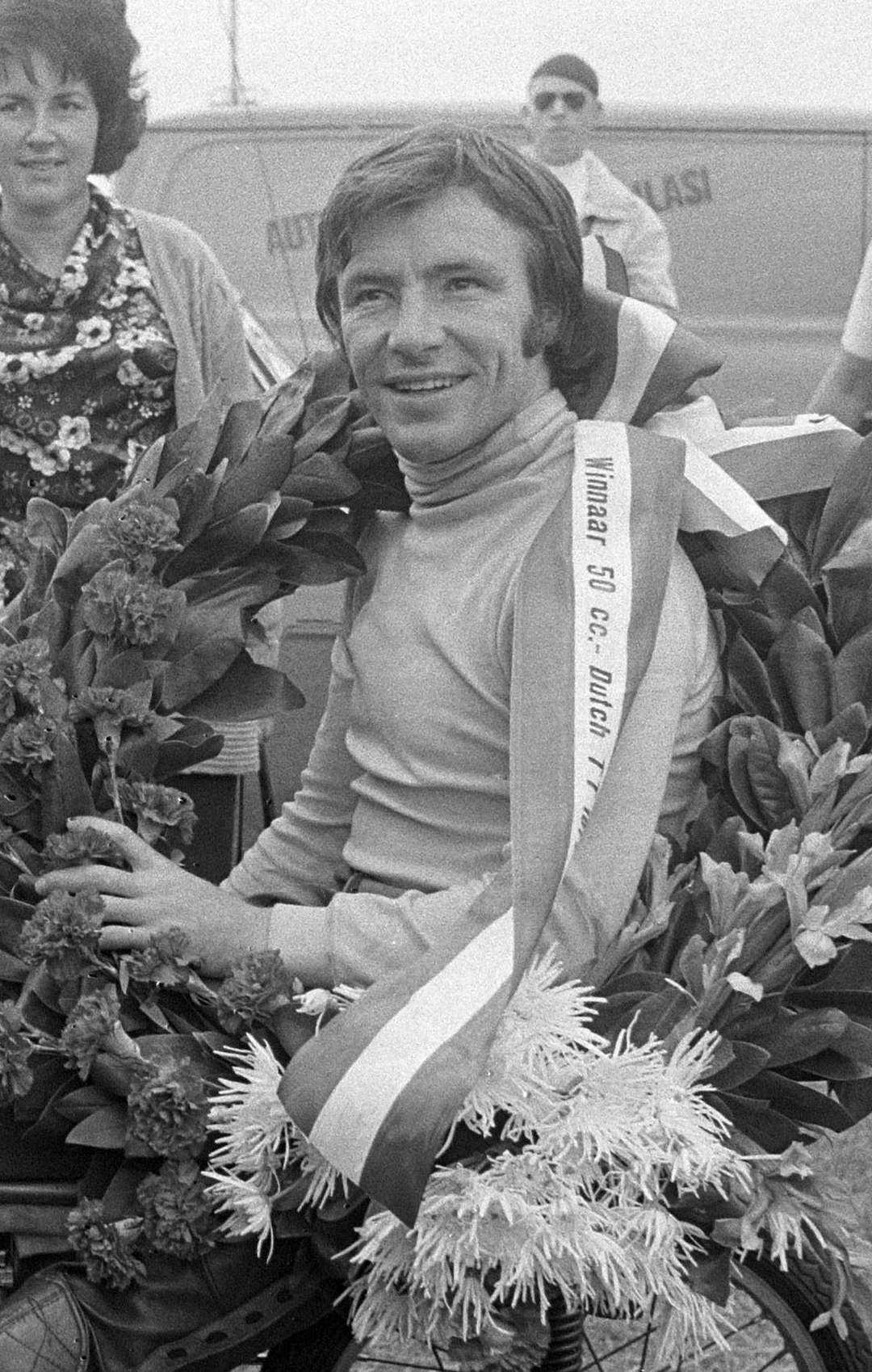 Ángel Nieto con la Derbi 50cc en Assen, 1972